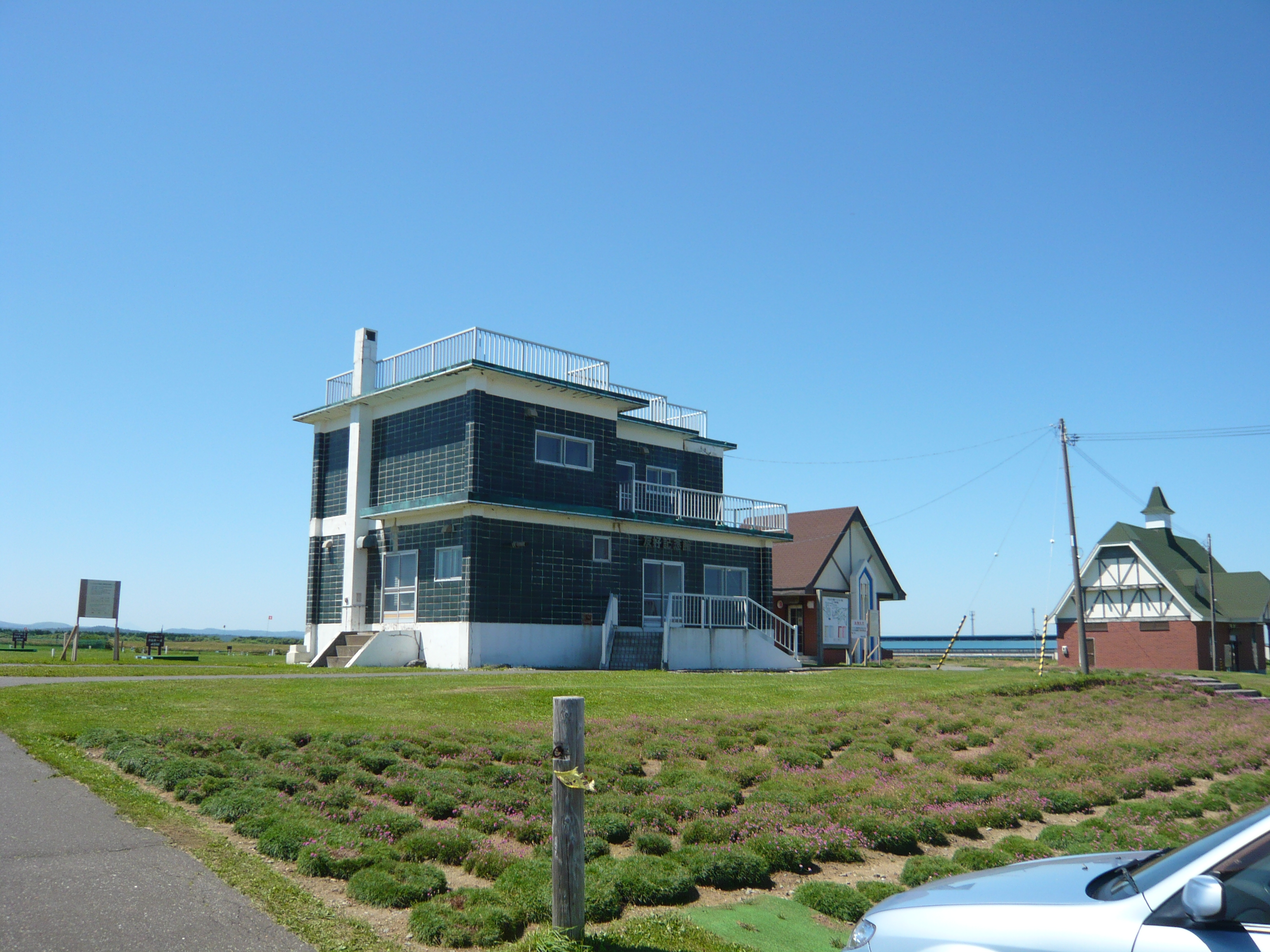 インディギルカ号の遭難地に建つ日露友好記念館。遭難時の資料が展示されている